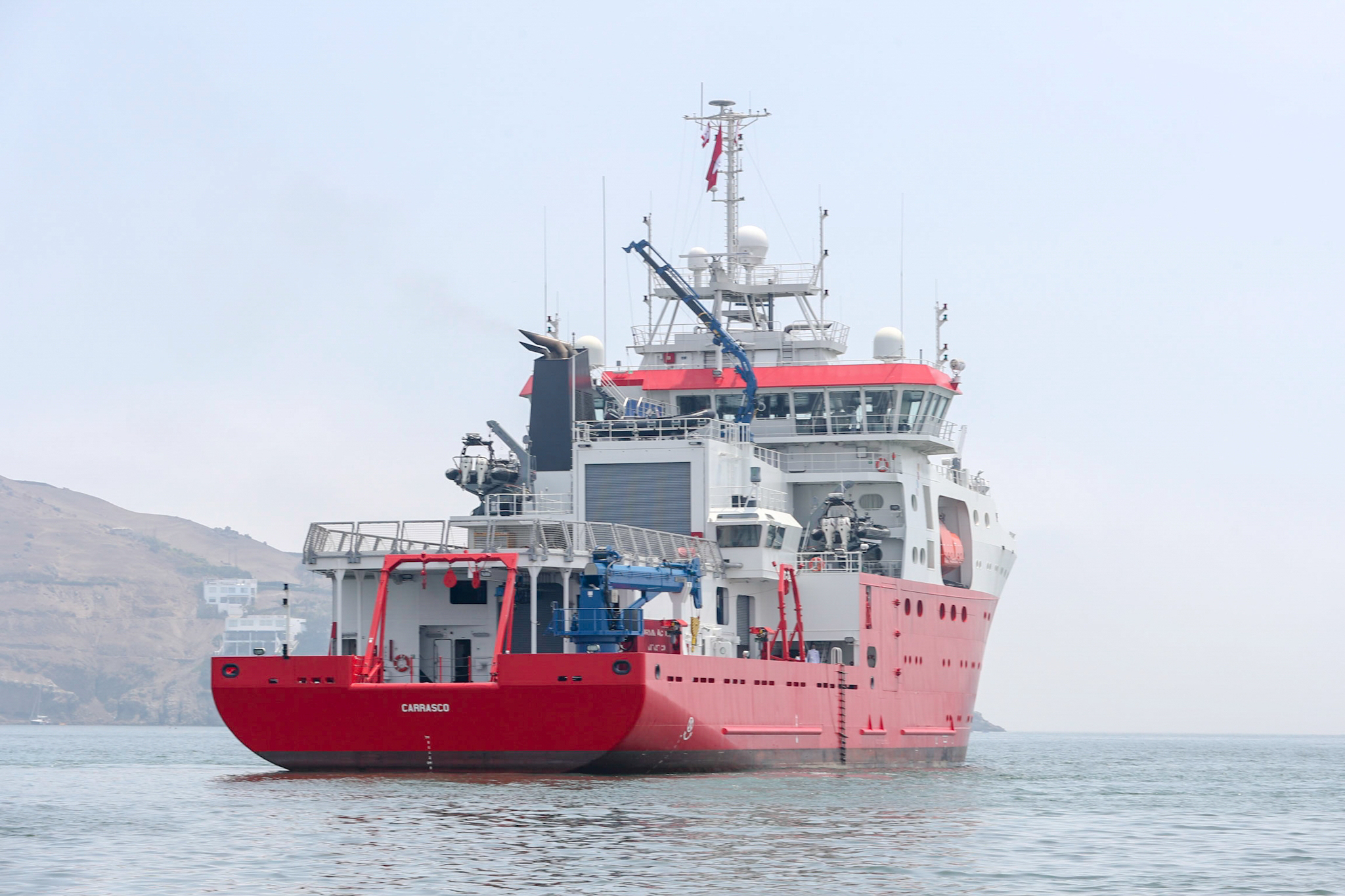 BAP Carrasco retornando al Callao de expedición ANTAR XXV (2018)